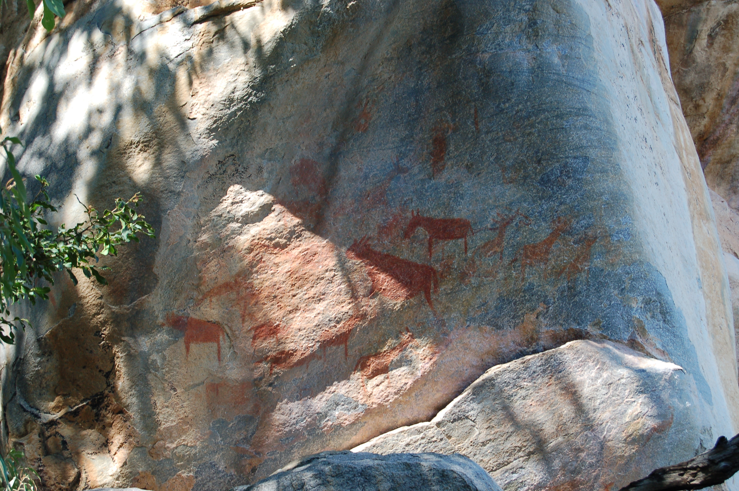 Tsodilo Hills, Botswana